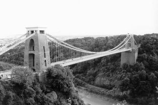 Isambard Brunels Clifton Suspension Bridge bei Bristol, 08/2000